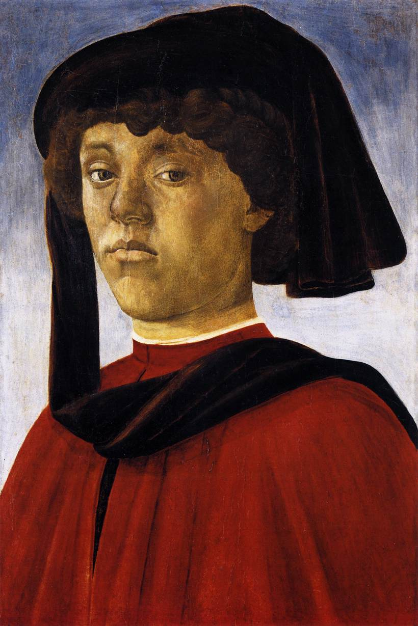 Lorenzo il popolano